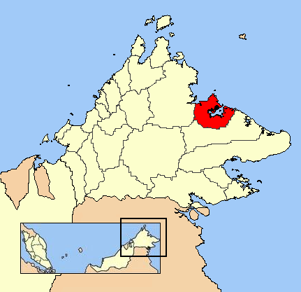 Sandakan location